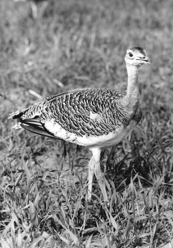 Großtrappe ADN-ZB Link 25.11.1981 Bezirk Magdeburg: Schutz der Großtrappe - Bei der künstlichen Aufzucht des schwersten flugfähigen Landvogels der Erde, der Großtrappe, haben sich die Mitarbeiter der Biologischen Station in Steckby des Instituts für Landschaftsforschung und Naturschutz der AdL Verdienste erworben. Seit 1973 wurden hier gestörte Gelege von Großtrappen erbrütet, 190 Großtrappen aufgezogen und wieder in Freiheit entlassen. Der vom Aussterben bedrohte Großvogel zählt heute in der DDR etwa 500 Exemplare auch dank der Bemühungen ehrenamtlicher Naturschutzhelfer. Die Großtrappe ist eine in der ganzen Welt geschützte Vogelart. Beim Internationalen Rat für Vogelschutz wurde eine Arbeitsgruppe Trappen gebildet. An den regelmäßig stattfindenden RGW-Trappen-Symposien beteiligt sich die Akademie der Landwirtschaftswissenschaften der DDR.